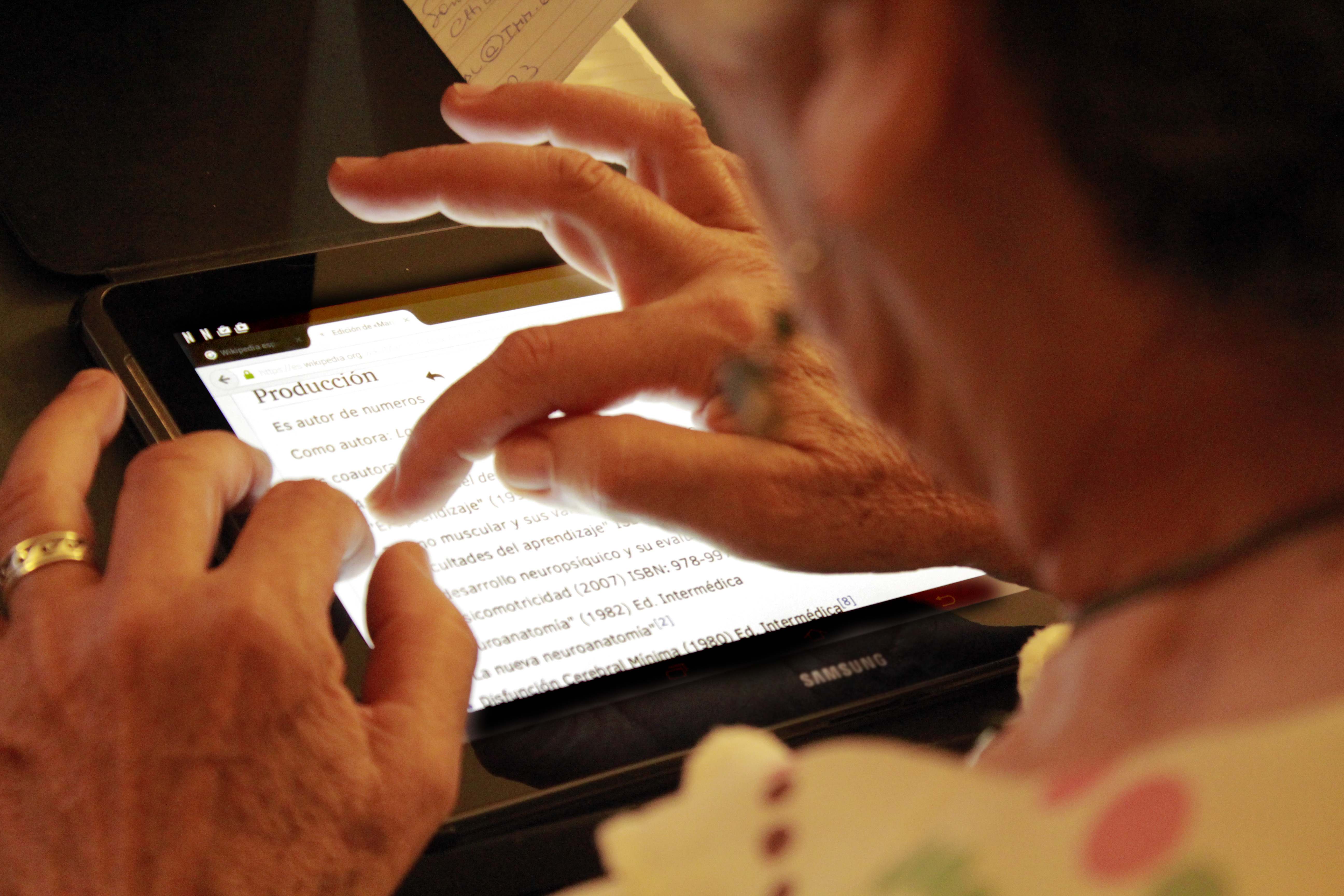 Lema: "Edito, luego existo". Editatón colectivo de biografías de mujeres uruguayas (31 de marzo de 2017); en la foto se observa a un participante editando.